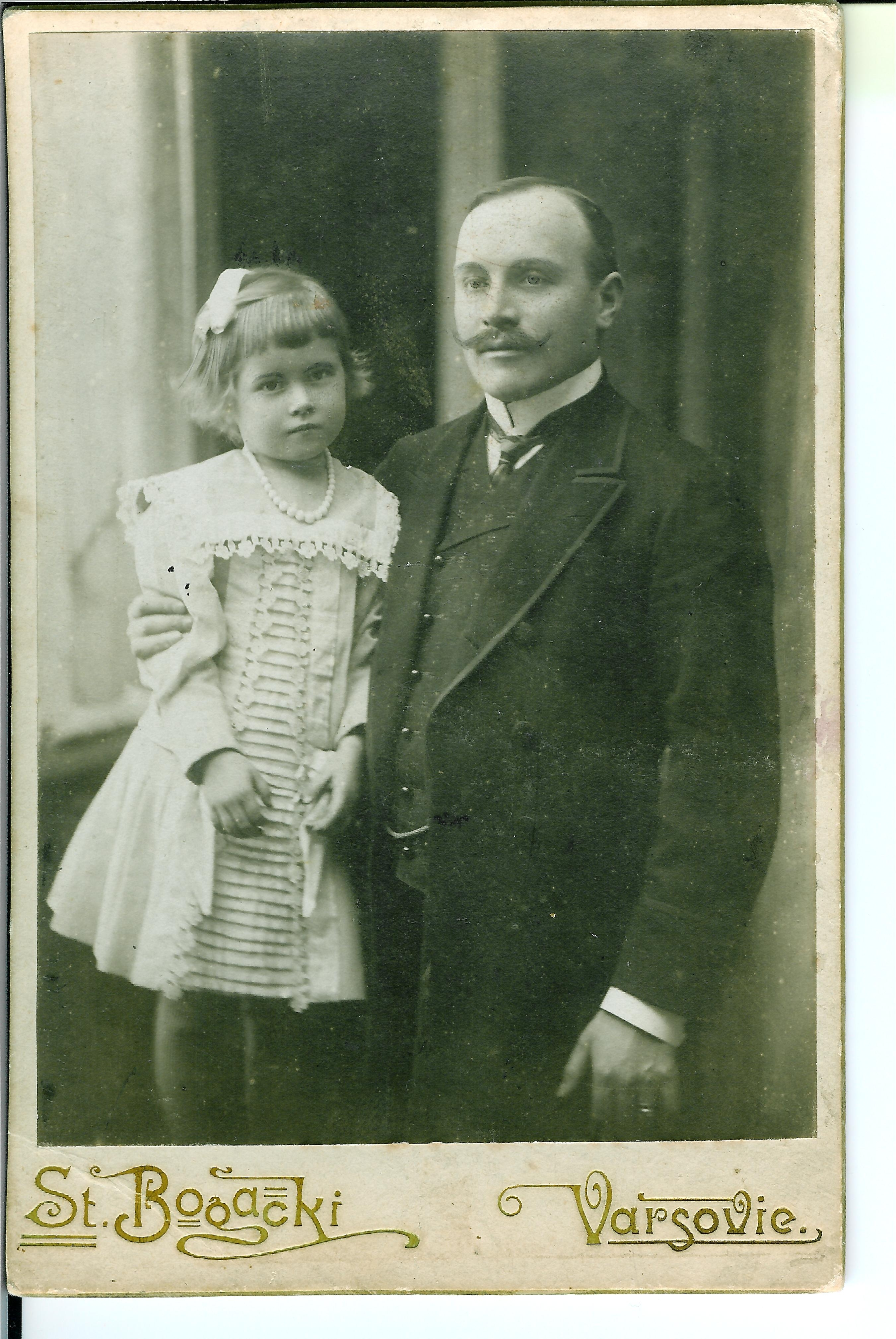 Tadeusz Czosnowski z córka 1909r